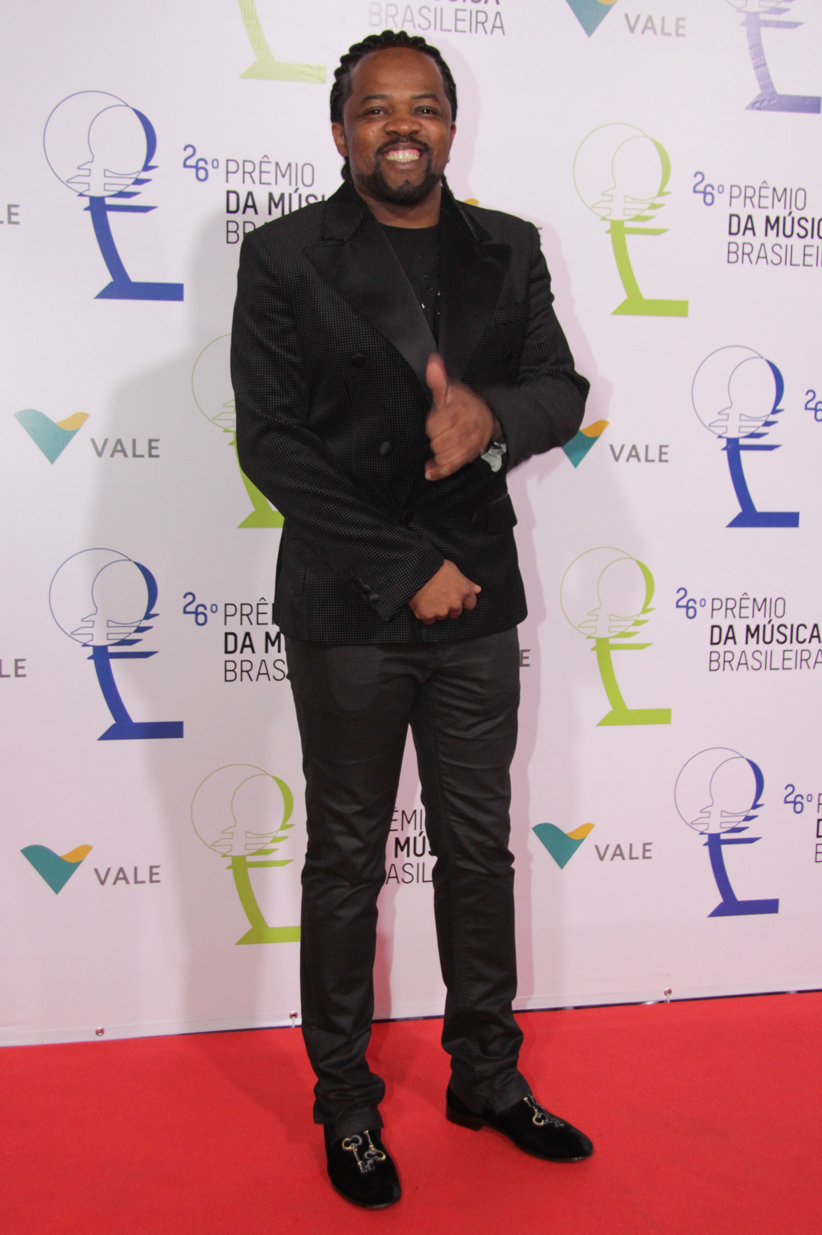 Xande de Pilares - 26° Prêmio da Música Brasileira 2015, no Theatro Municipal, no Centro do Rio de Janeiro/RJ. (10/06/15) Foto: Roberto Valverde/Divulgacão